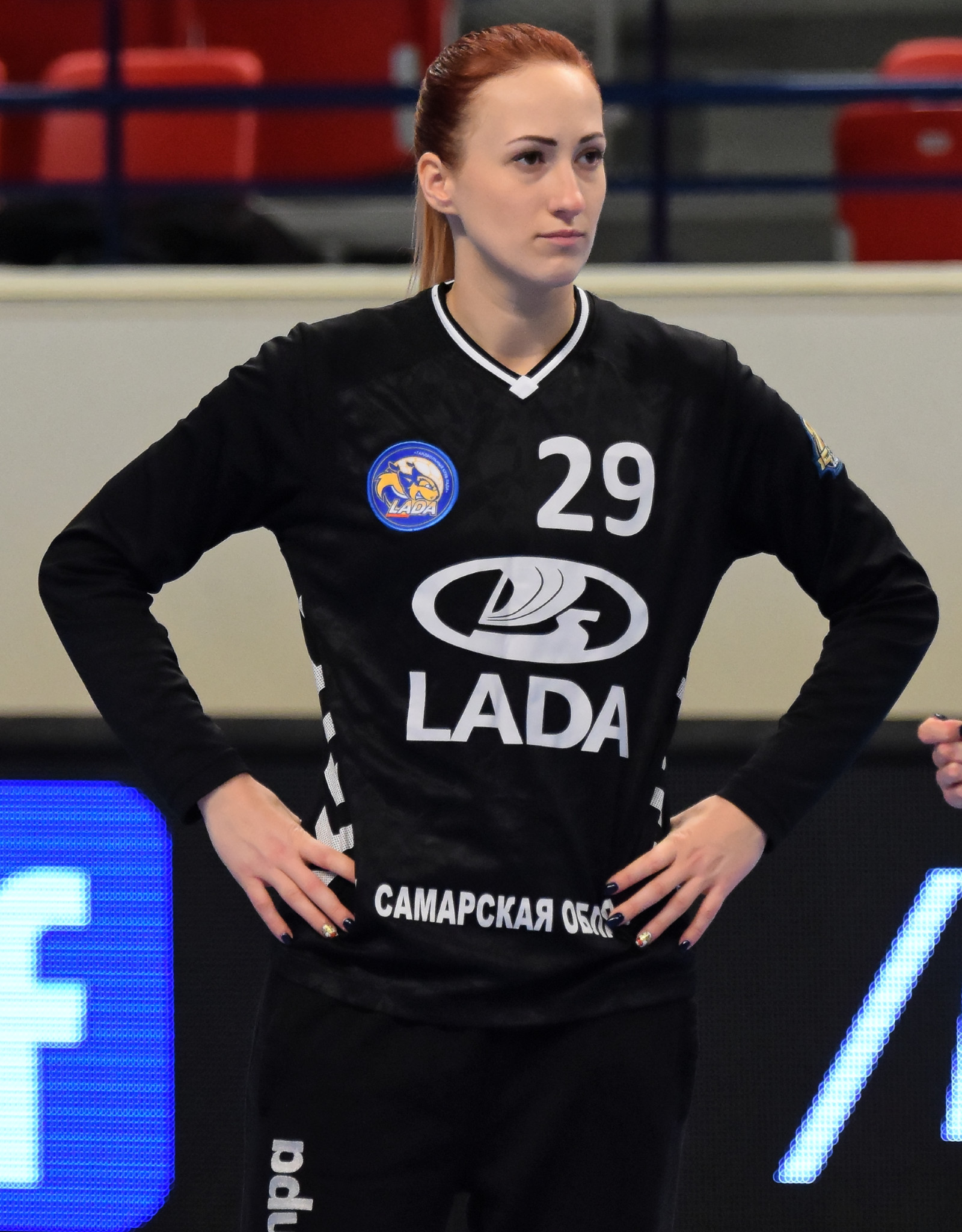 Match de coupe EHF entre Issy Paris Hand et les russes de Lada Togliatti. A Coubertin, le 12 janvier 2018.